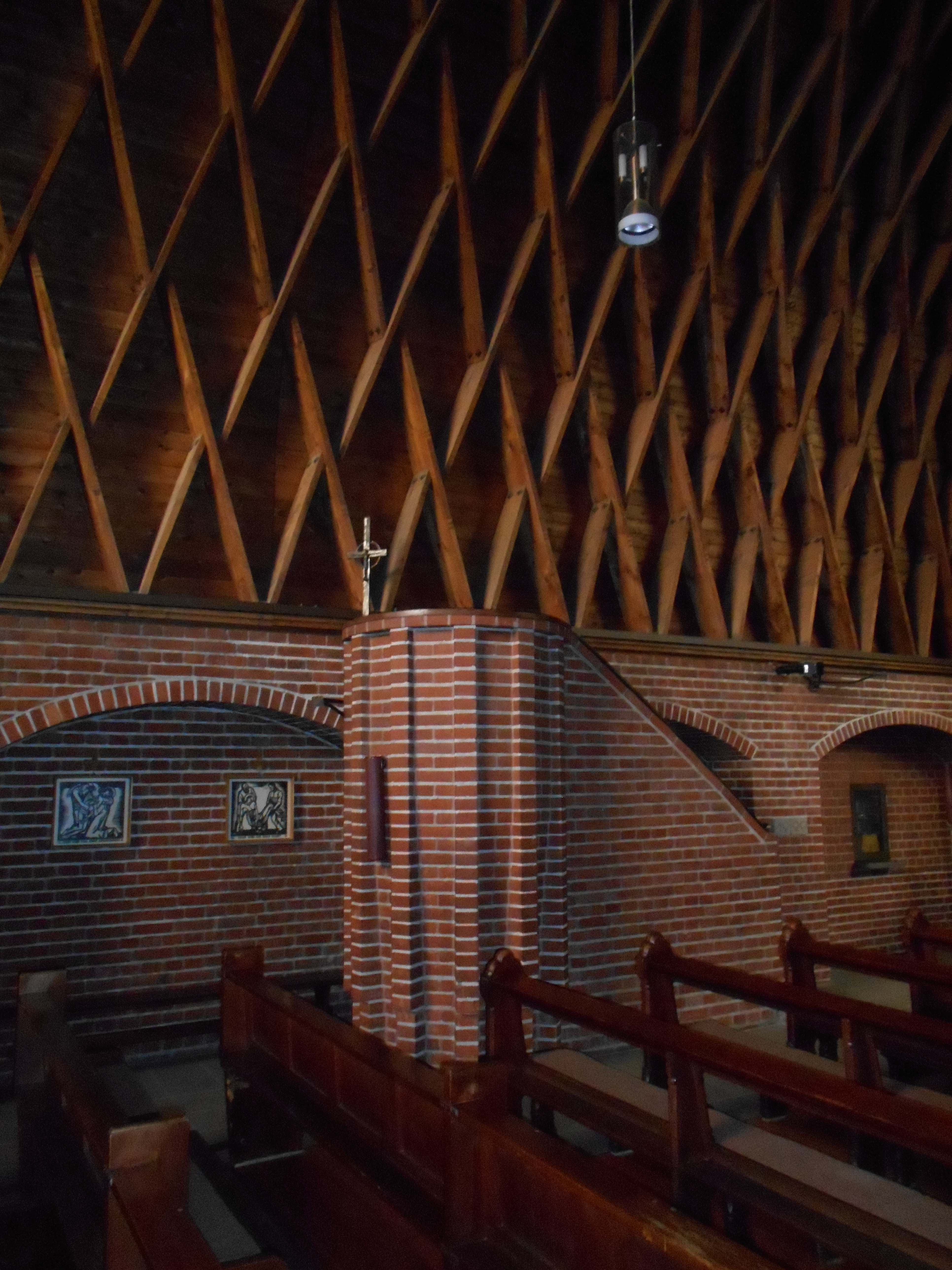 Kanzel der Kirche Mariä Himmelfahrt in Güstrow Landkreis Rostock